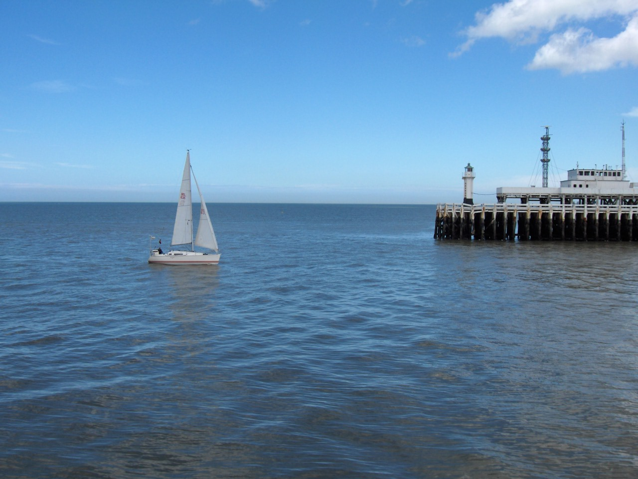 Oostende - Belgium yacht entering the harbor